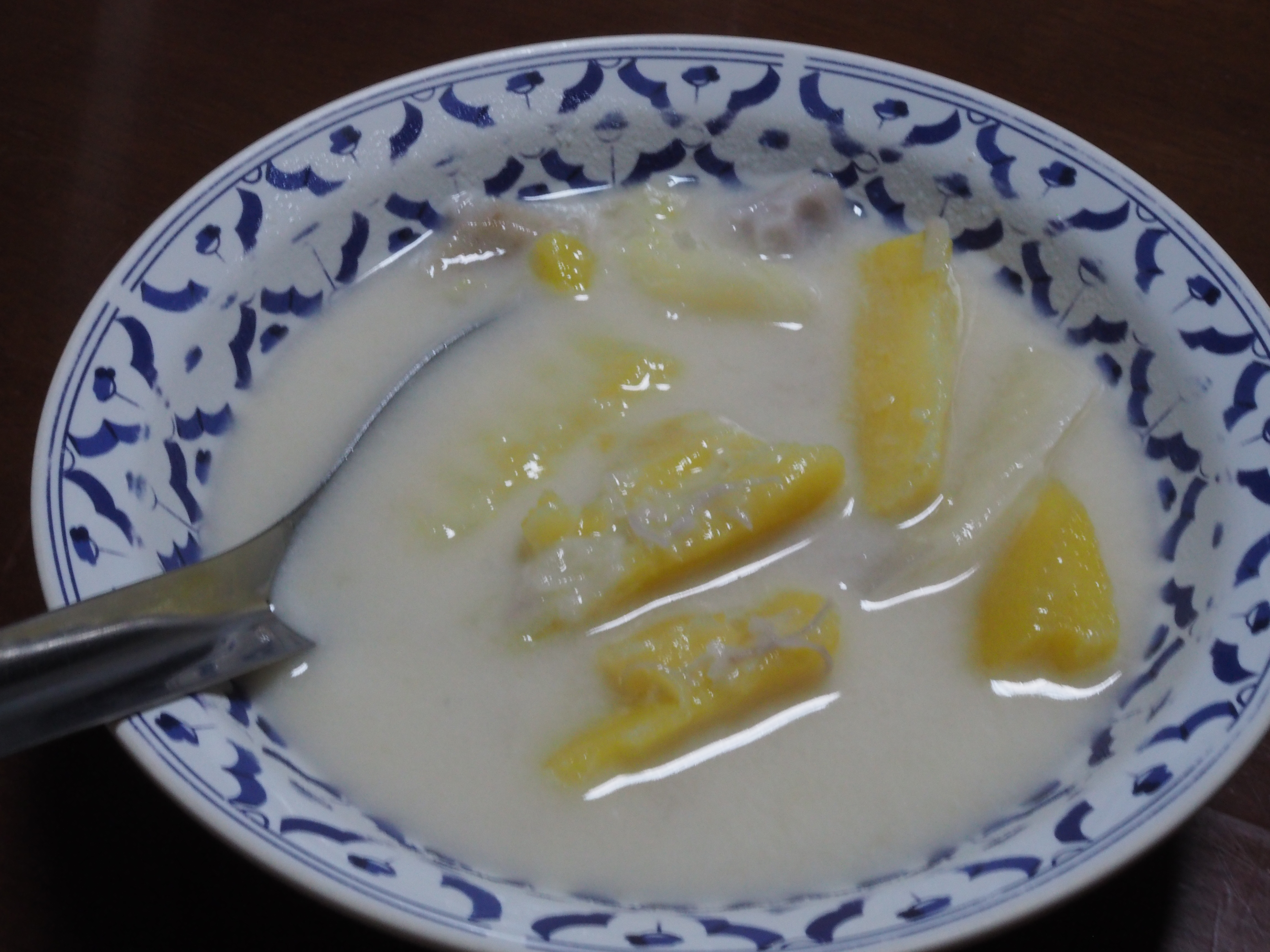 มันแกงบวด